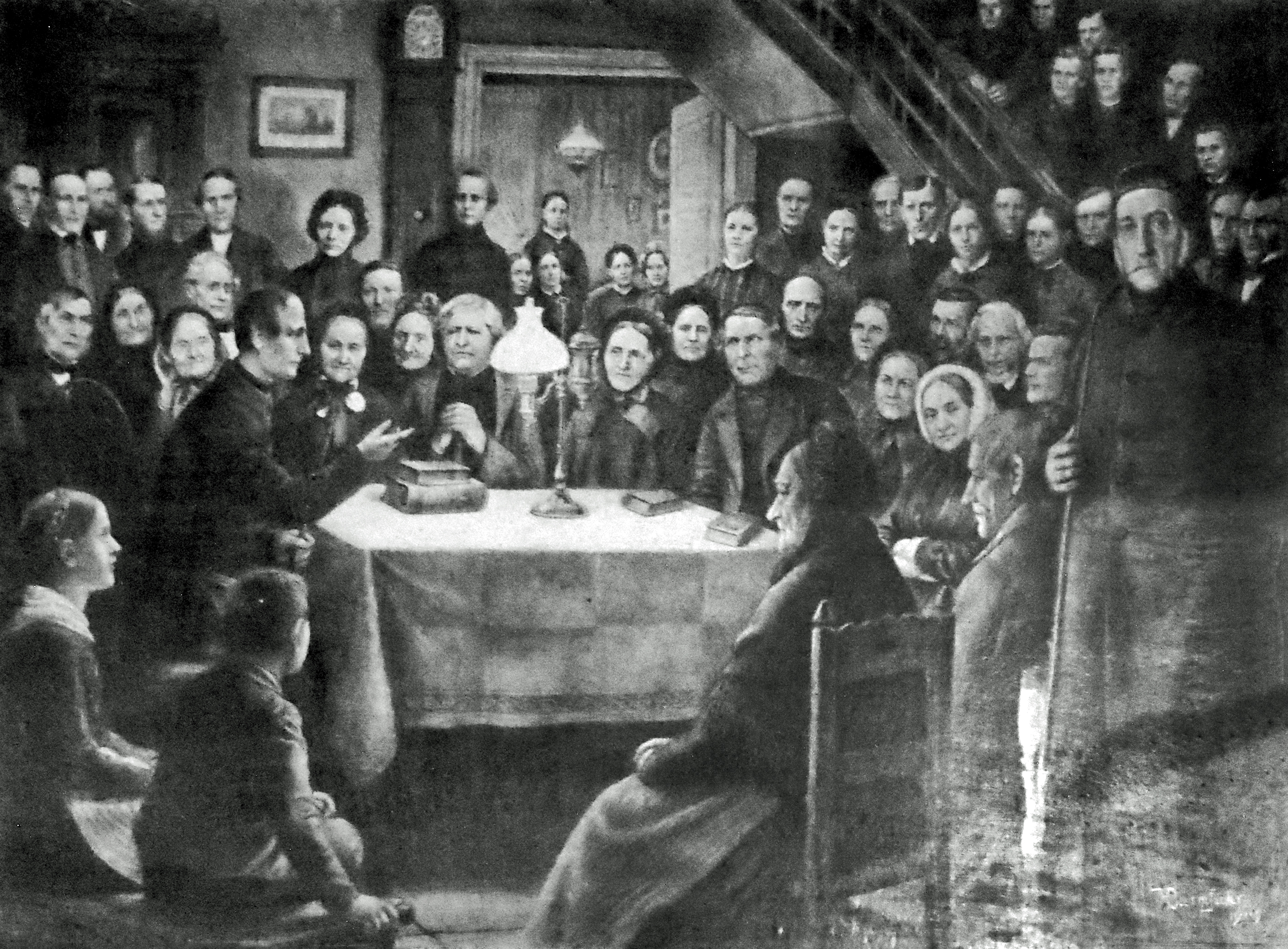 Sonntagabend bei Louis Harms